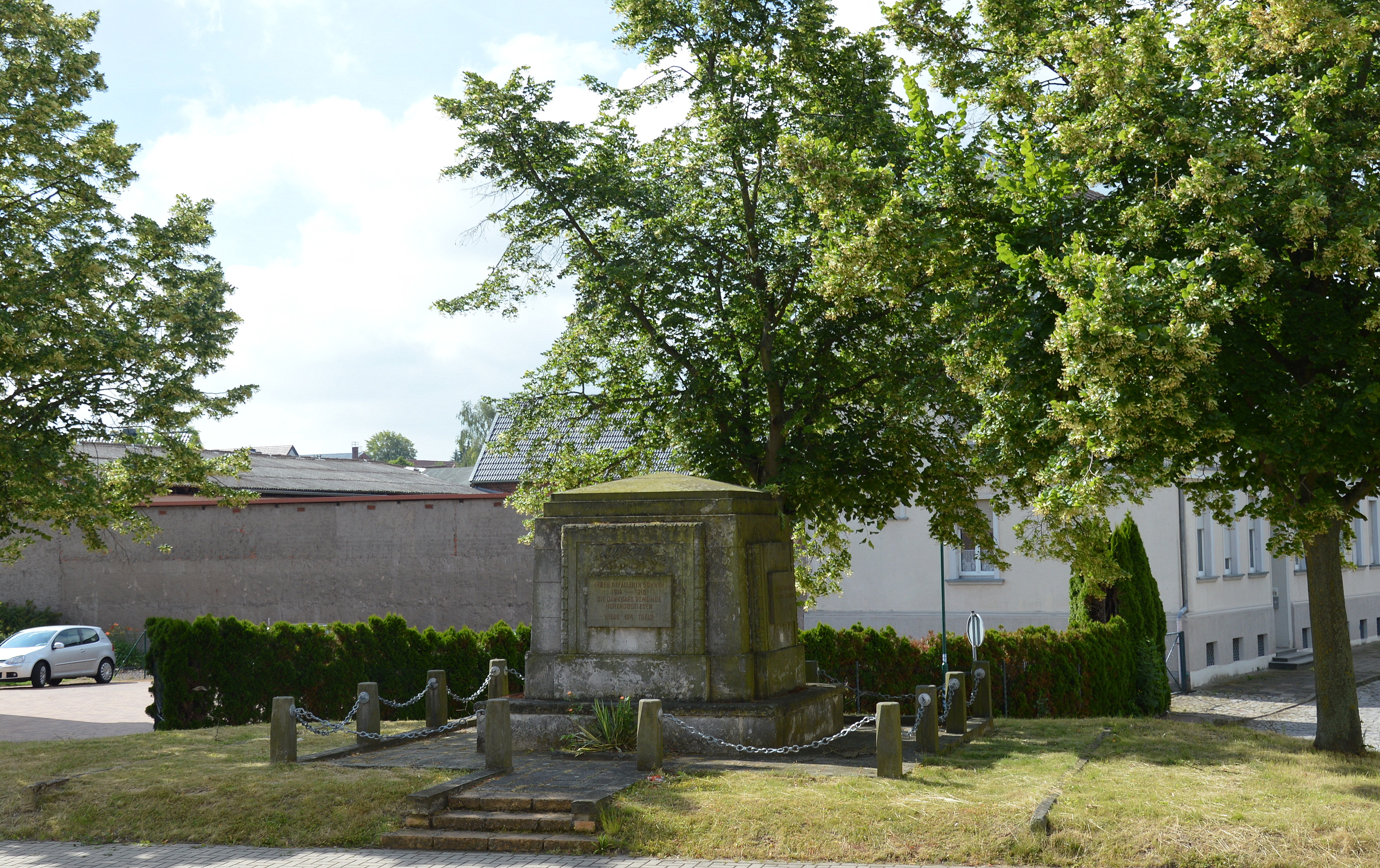 Kriegerdenkmal Hohendodeleben Matthissonstraße